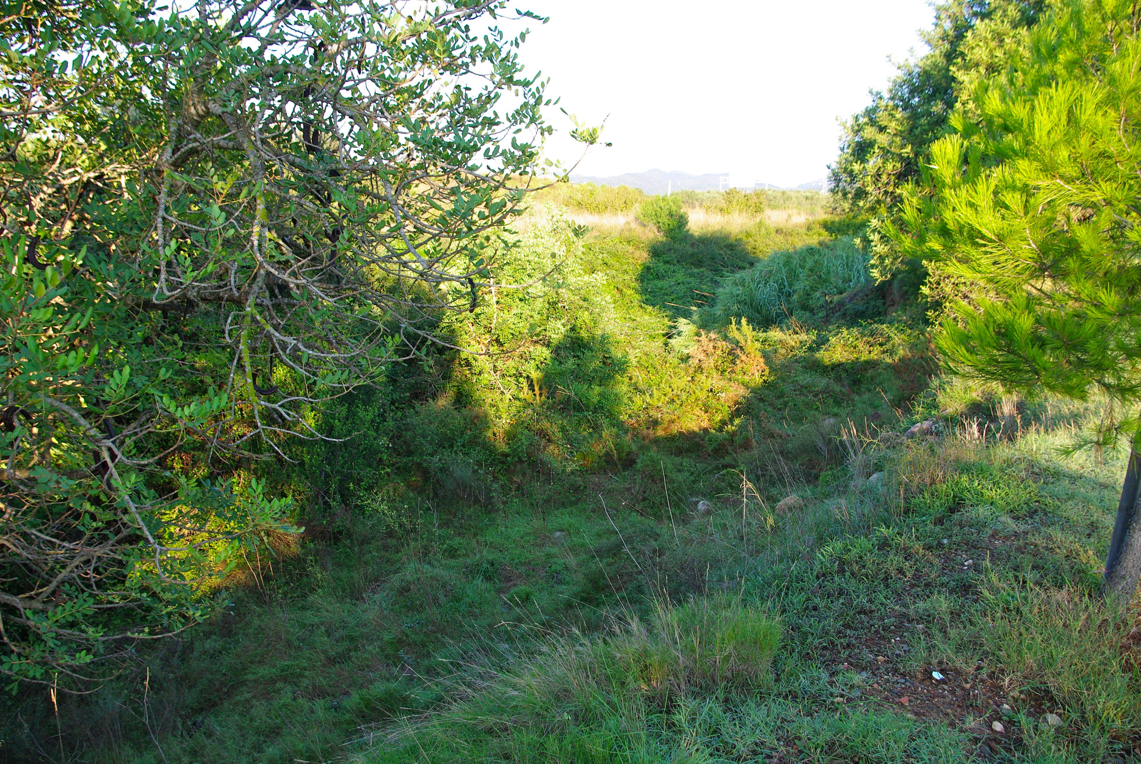 Barranc del Roquís vora el Mas de les Ànimes, al terme de Reus